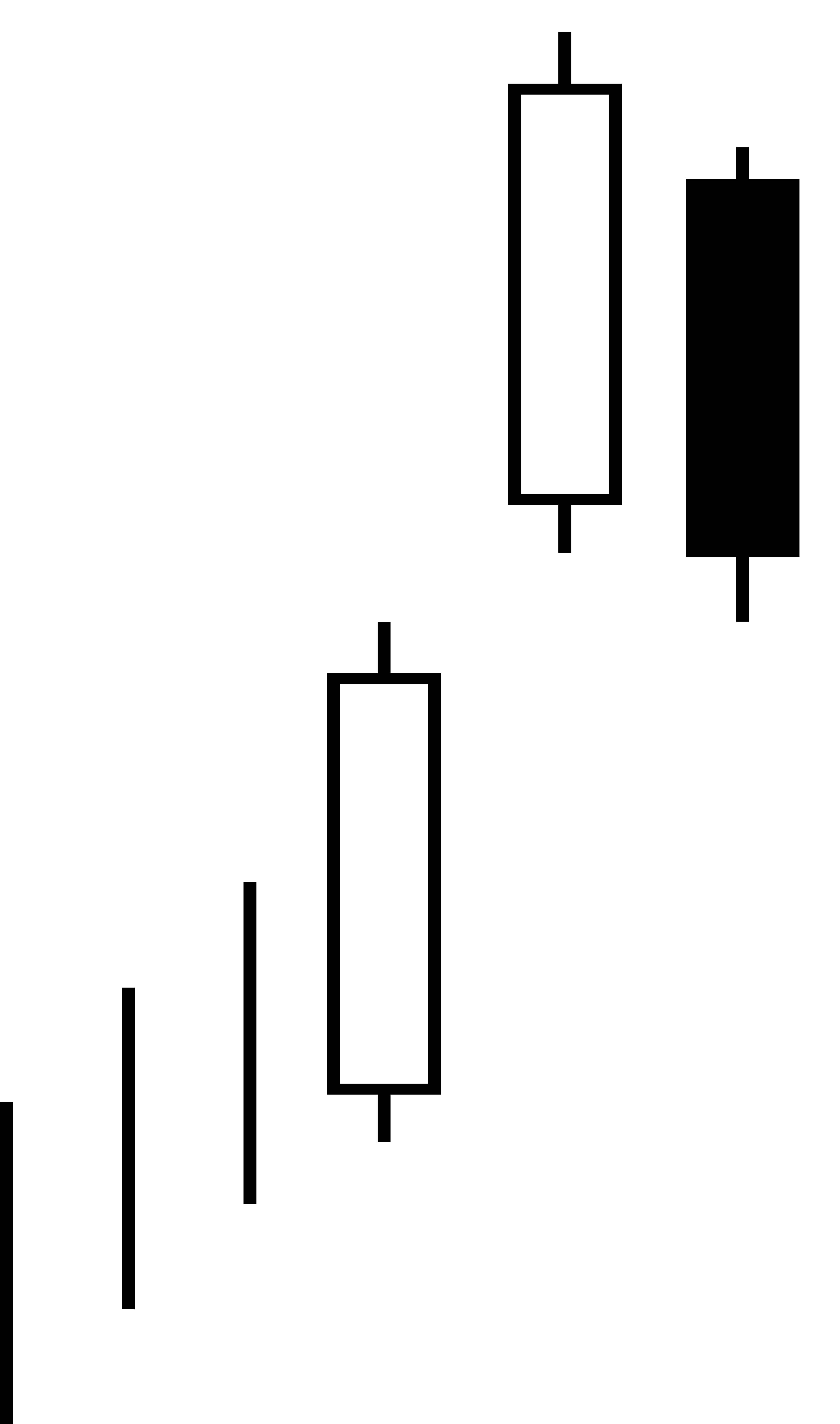 Bullish Upside Tasuki Gap